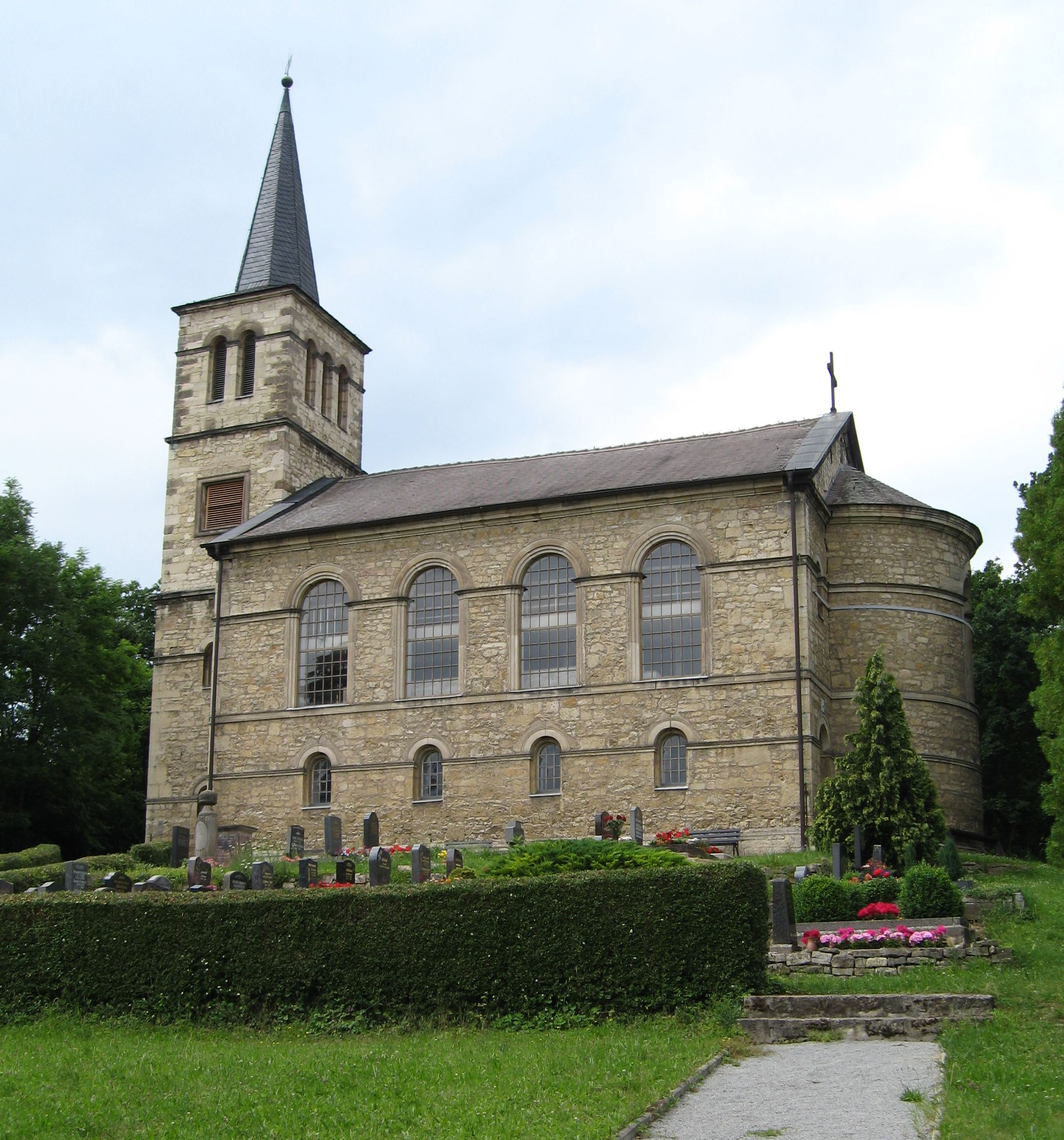 Die Kirche in Kleinjena. - OpenStreetMap (Info)